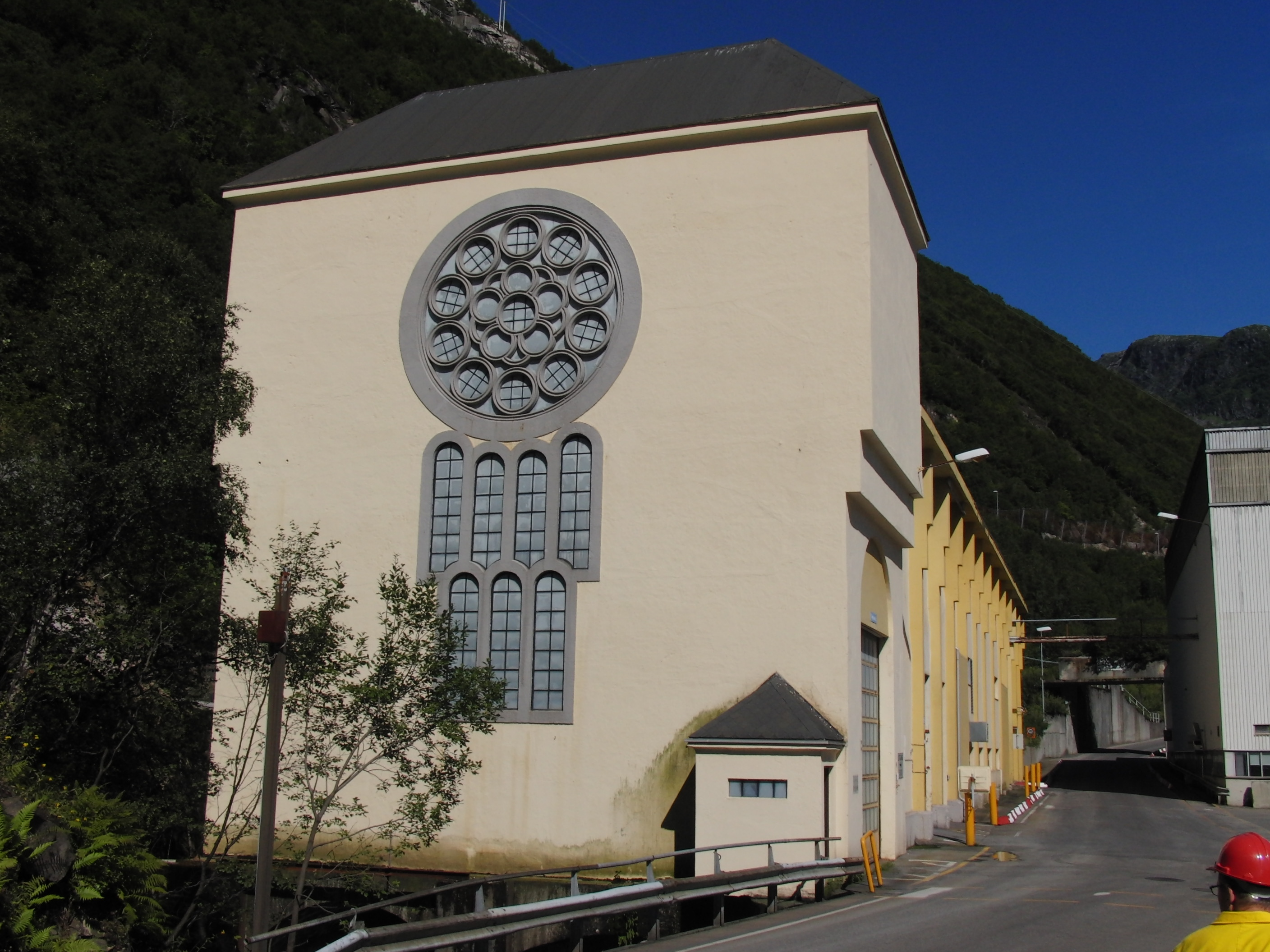 Høyanger K1 kraftverk (nedlagt)